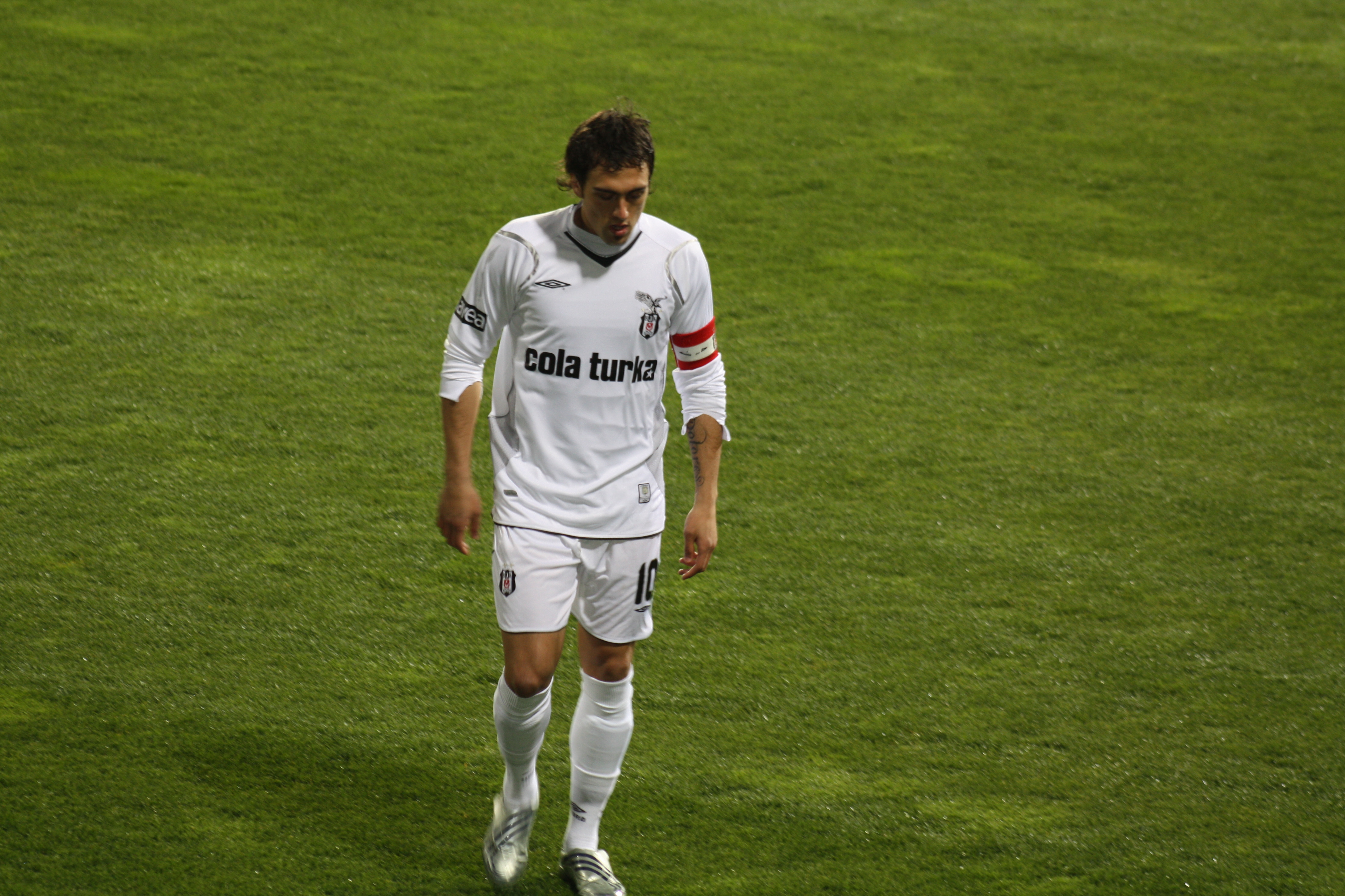 Matias Delgado 2009